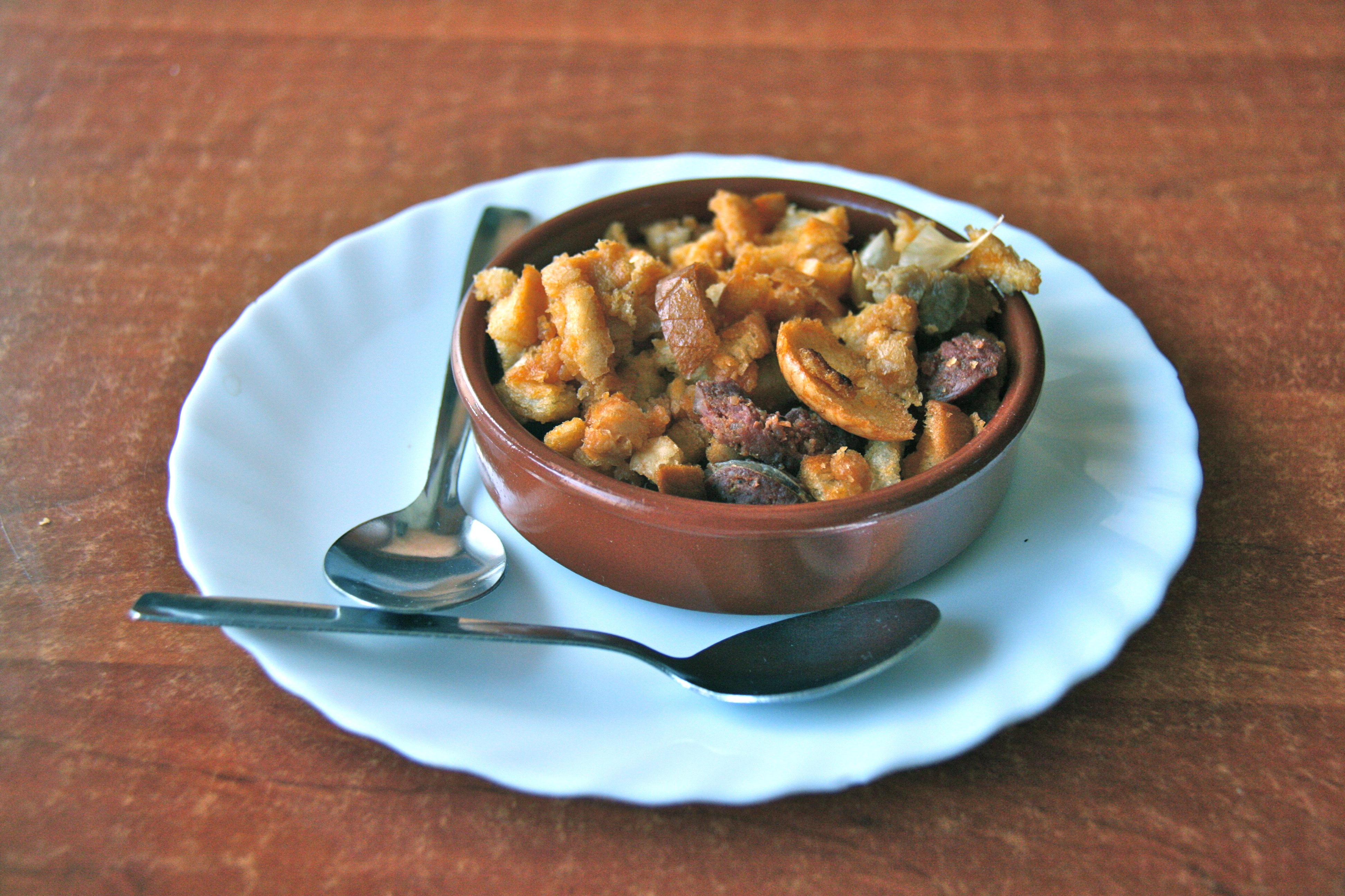 Migas en Toledo